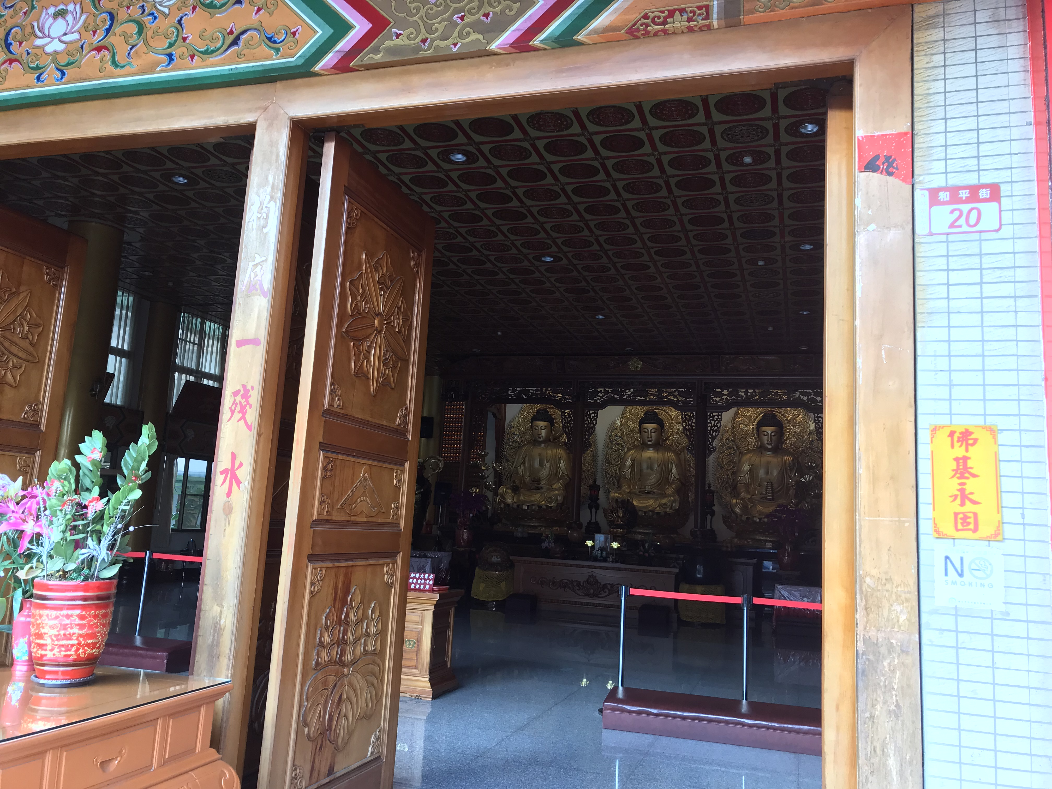 中文（台灣）: 員林禪寺大雄寶殿三寶佛